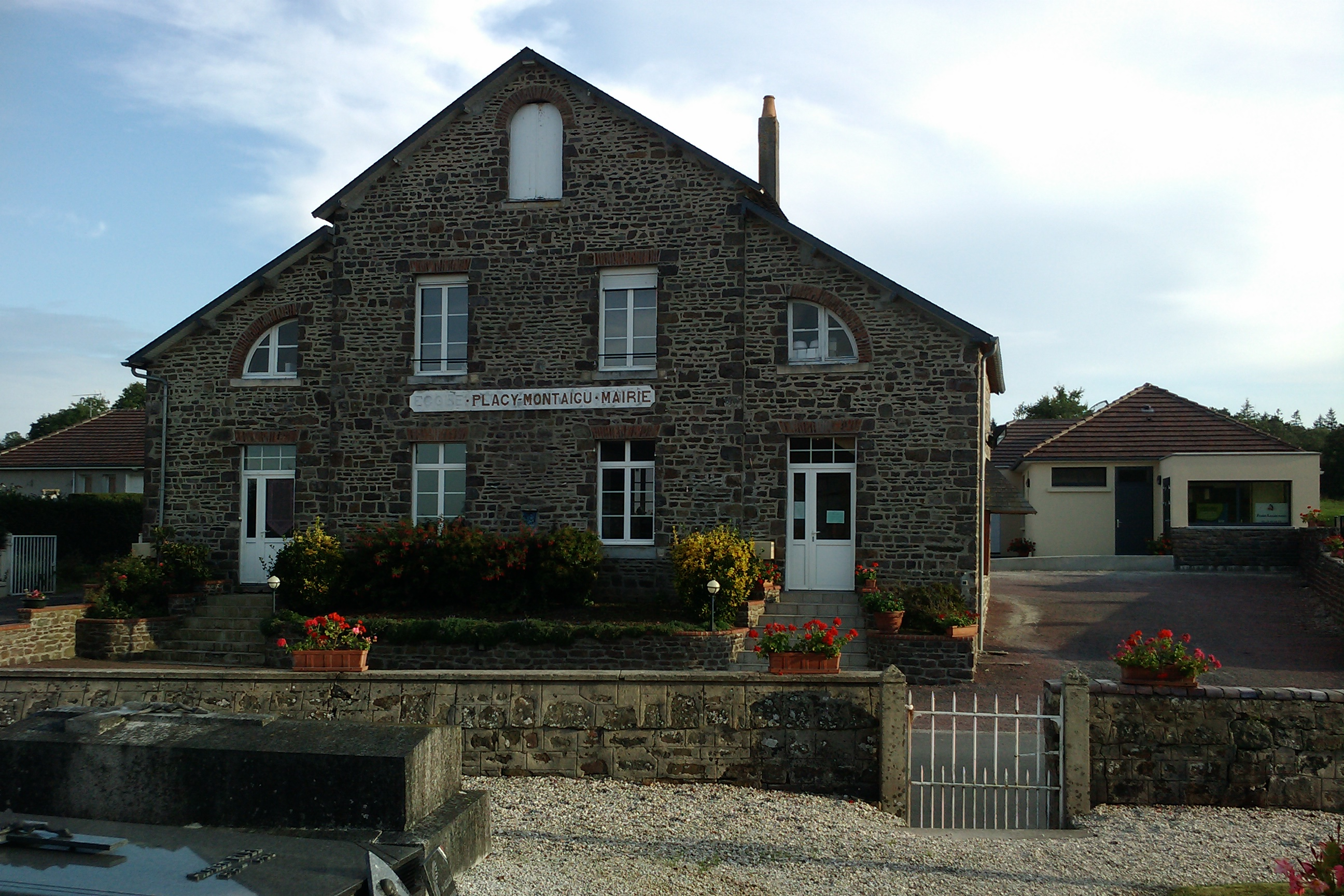 Mairie de